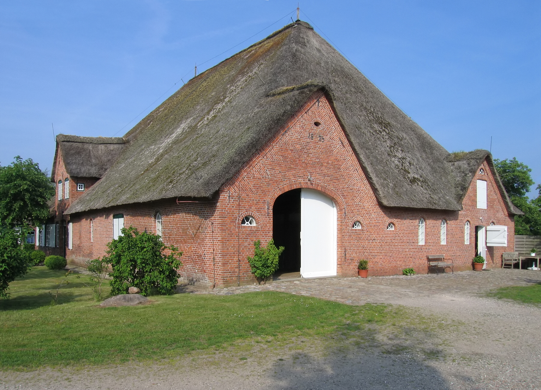 Haubarg oder Gulfhaus von 1825